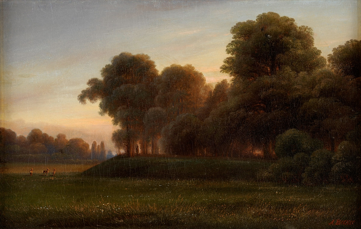 Waldlichtung mit Rehwild. Signiert. Öl/Lwd., 33 x 51,5 cm.